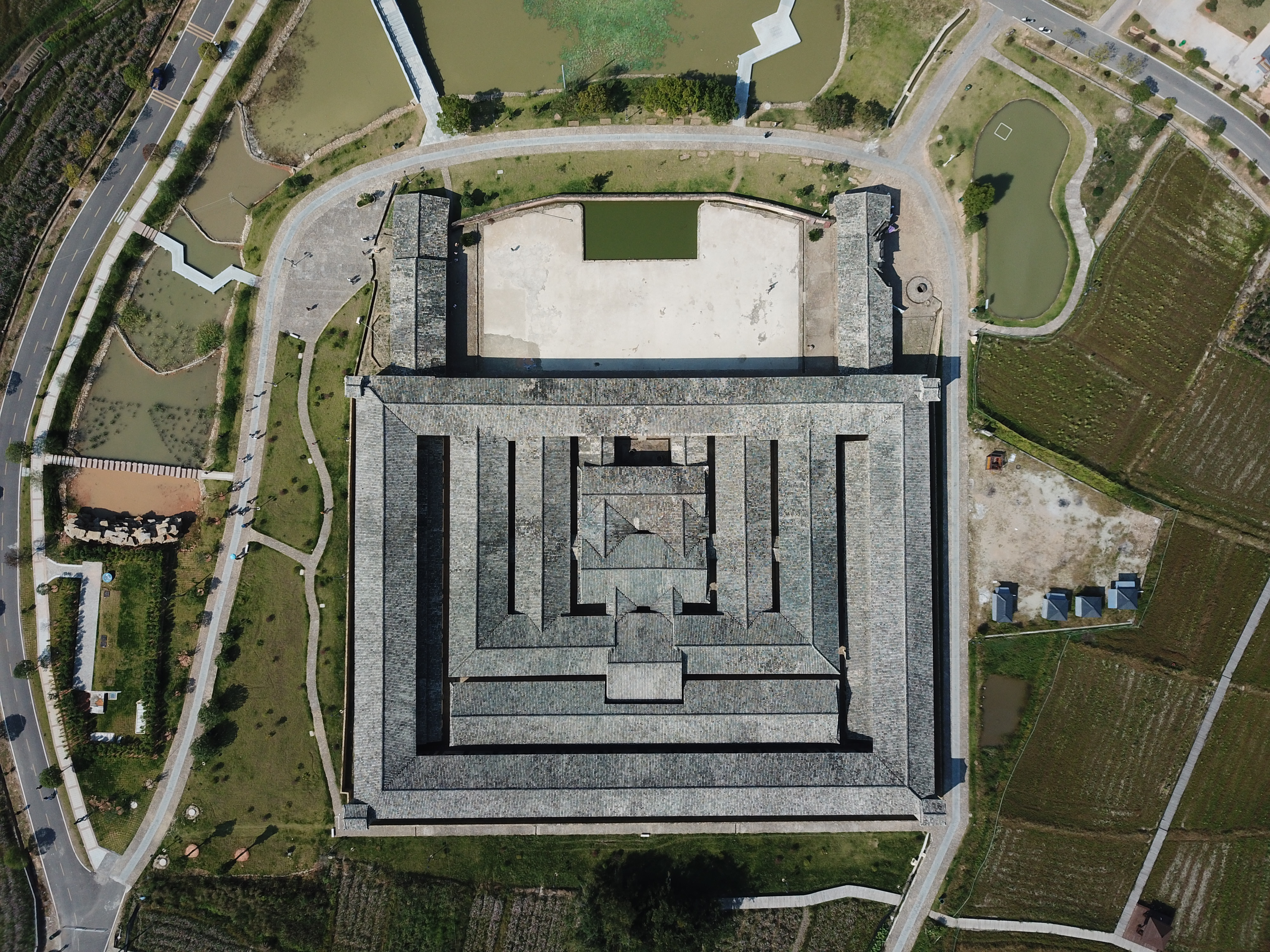 东生围